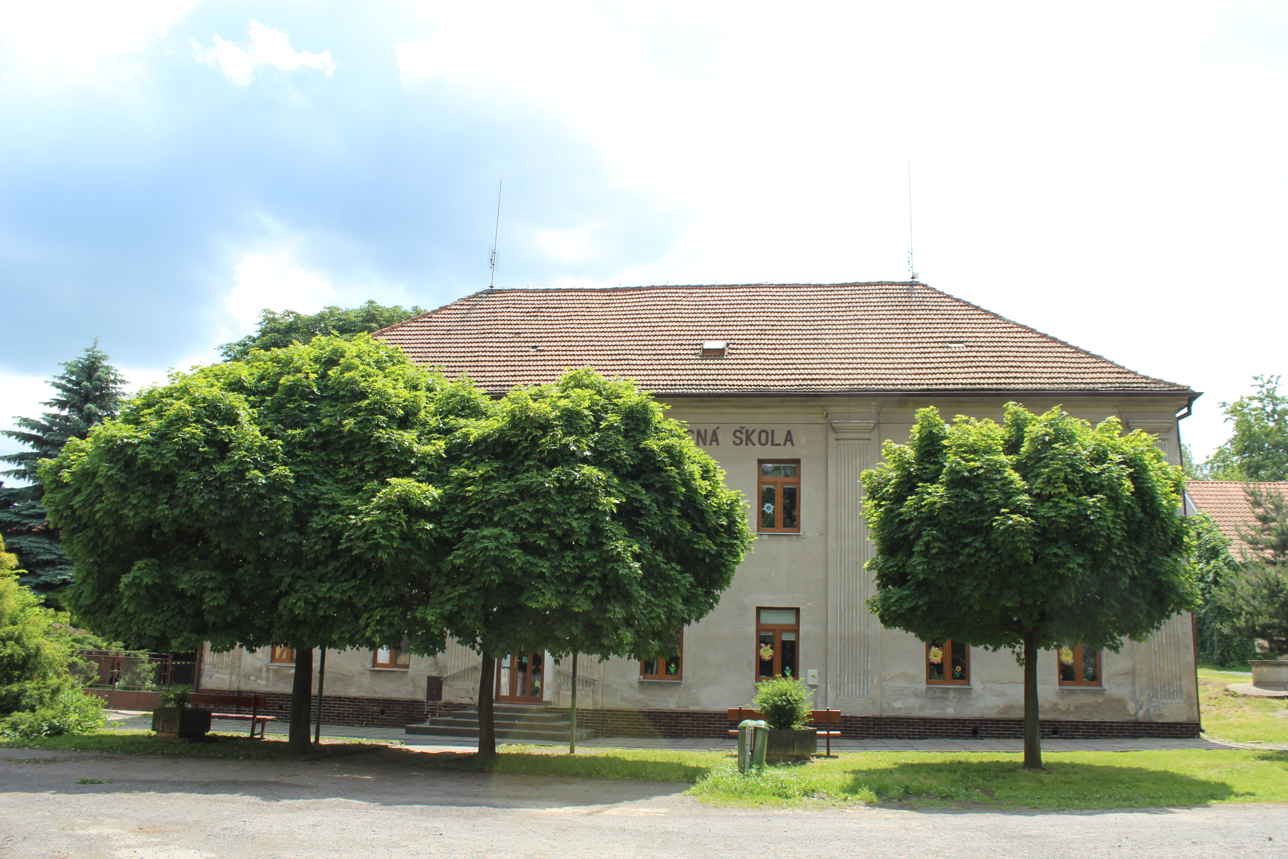 Obecná škola v Bratronicích v kladenském okrese.